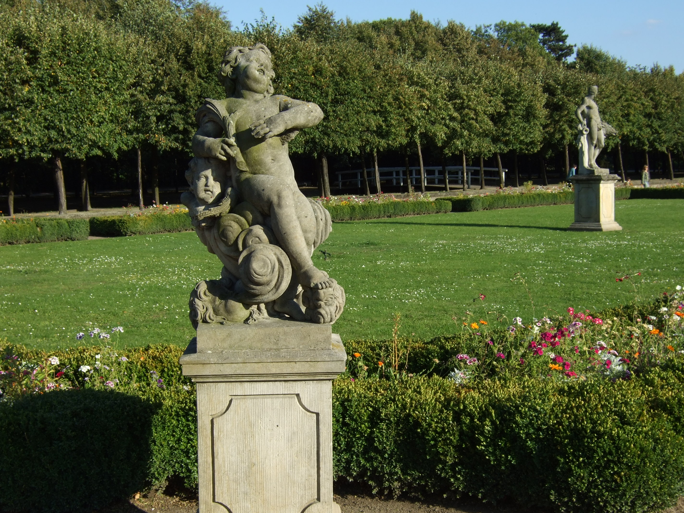 Gartenplastiken